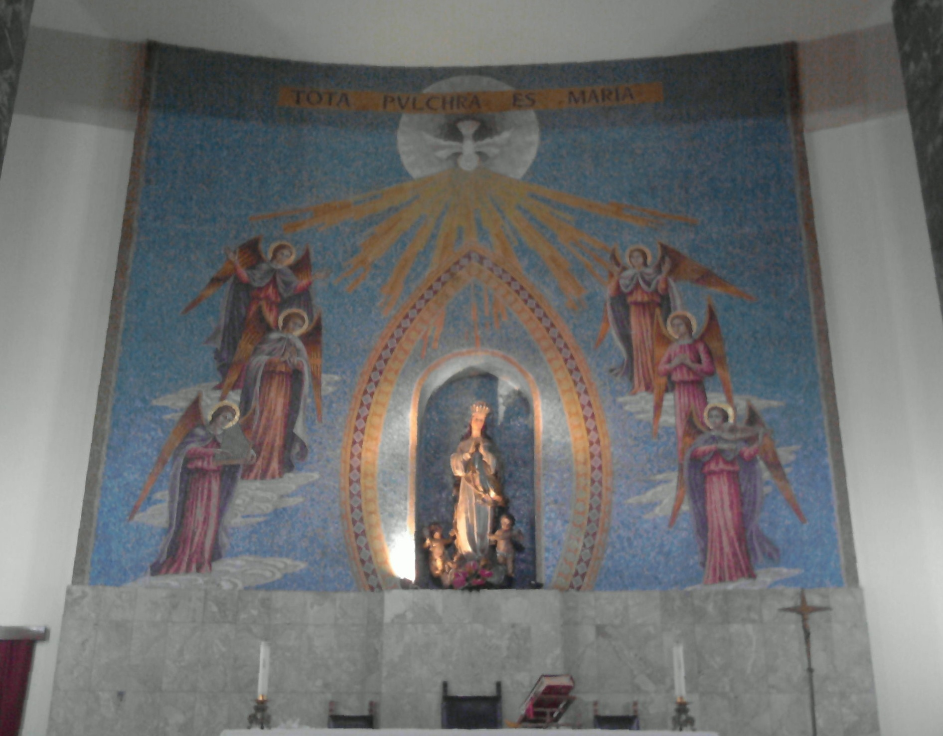 Il mosaico di scuola fiorentina con la statua di Maria Santissima Immacolata, collocato dietro l'altare maggiore della Chiesa di Maria Santissima Immacolata e San Rocco a Palmi.